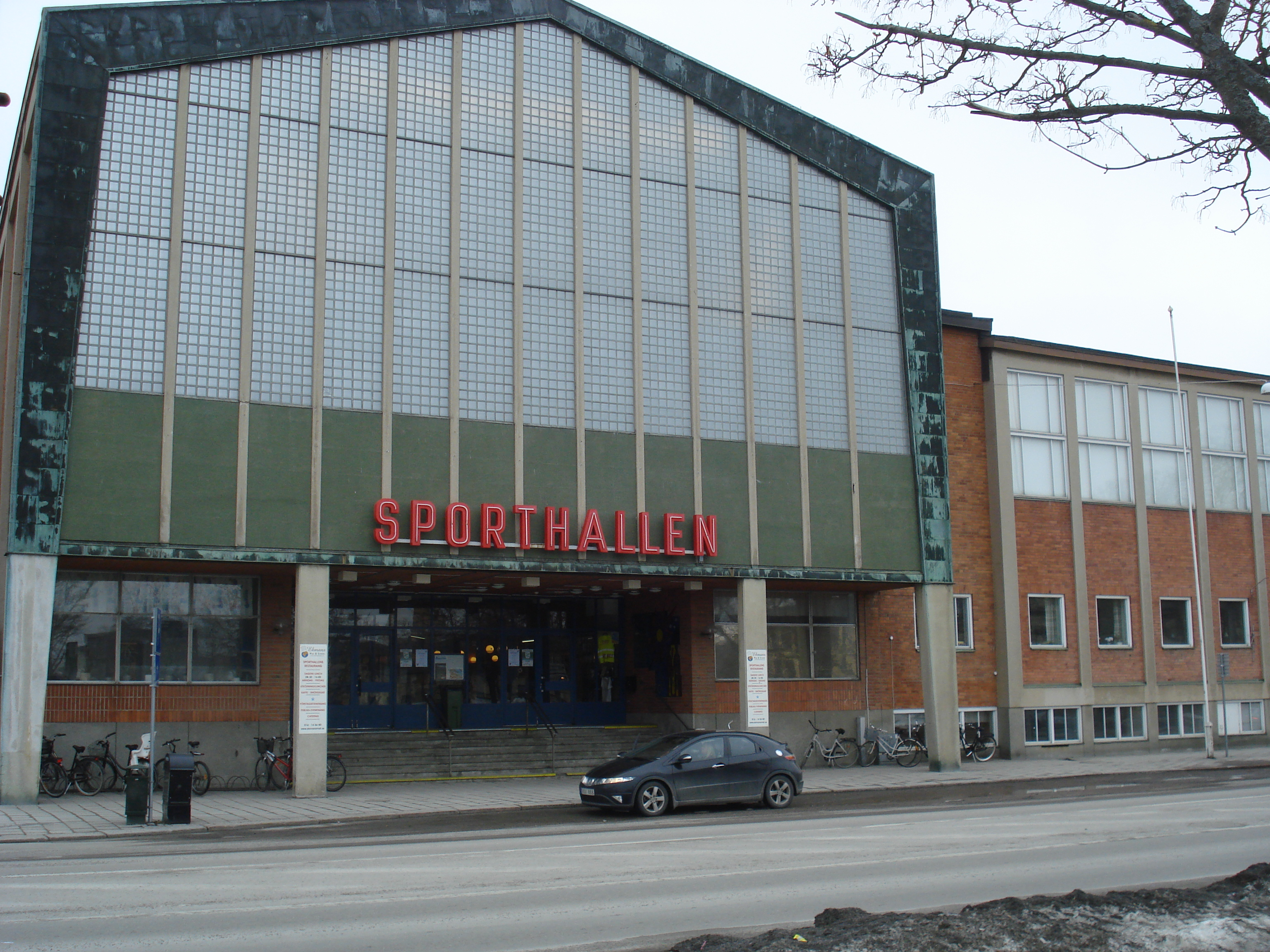 Bild på Eskilstuna sporthall. Tagen från Hamngatan.